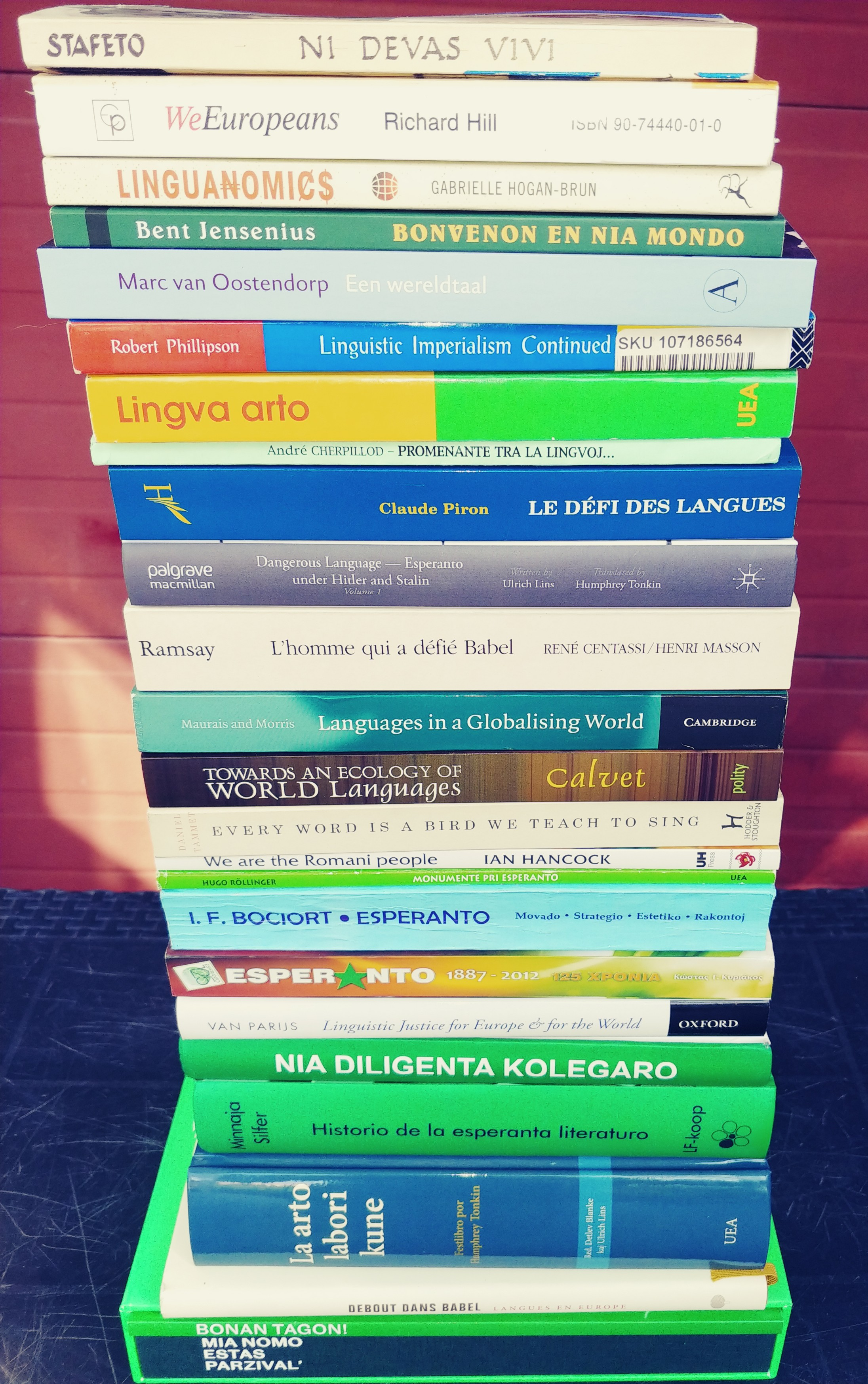 Cundoki : stako da aĉetitaj linbroj ne jam legitaj